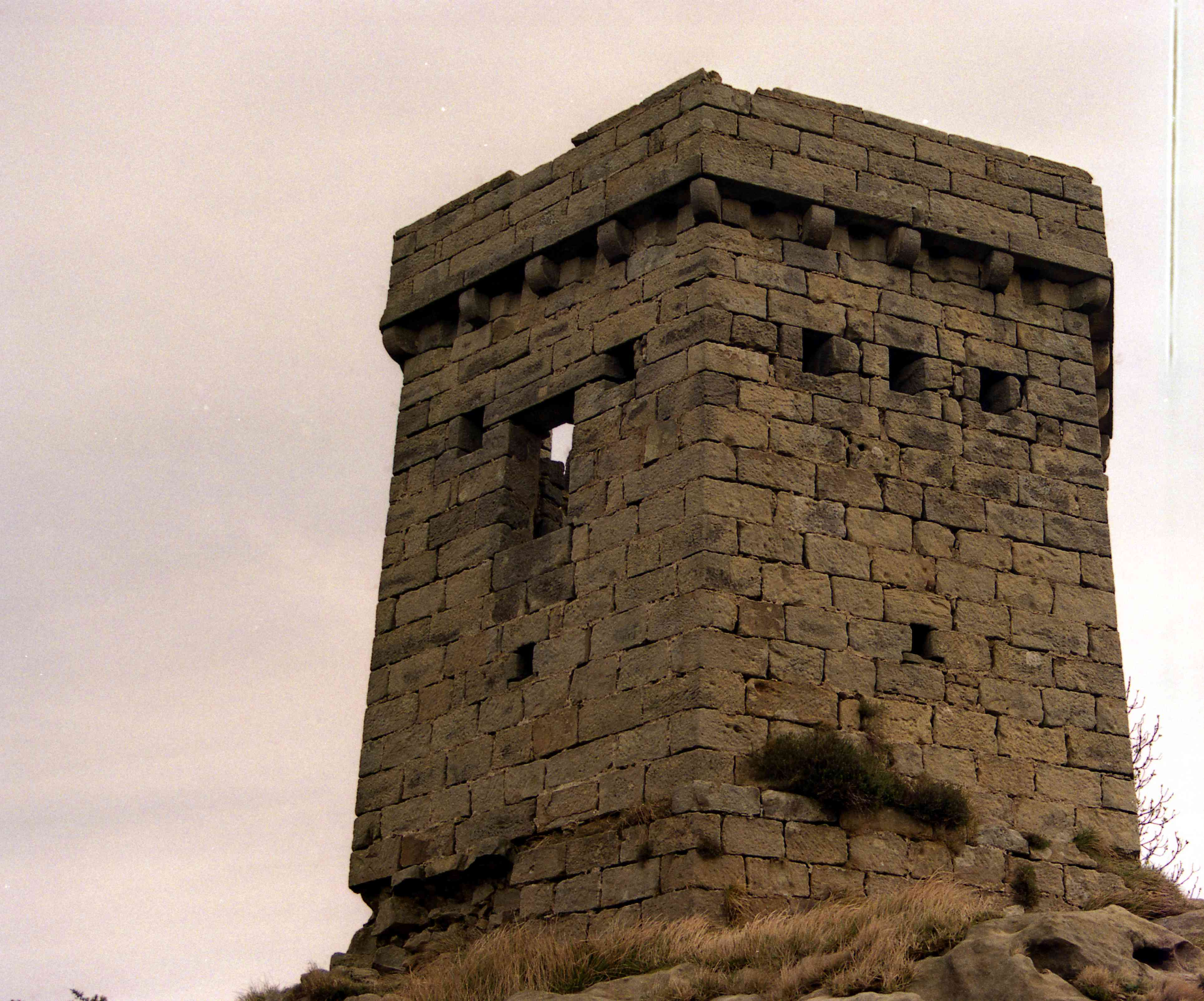 Jaizkibelgo Torreoi bat